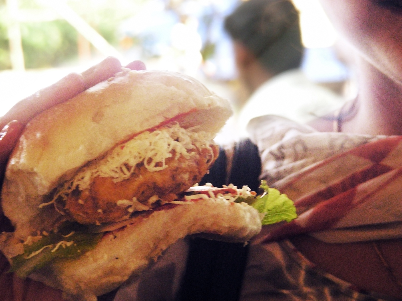 Jumbo Vada Pav